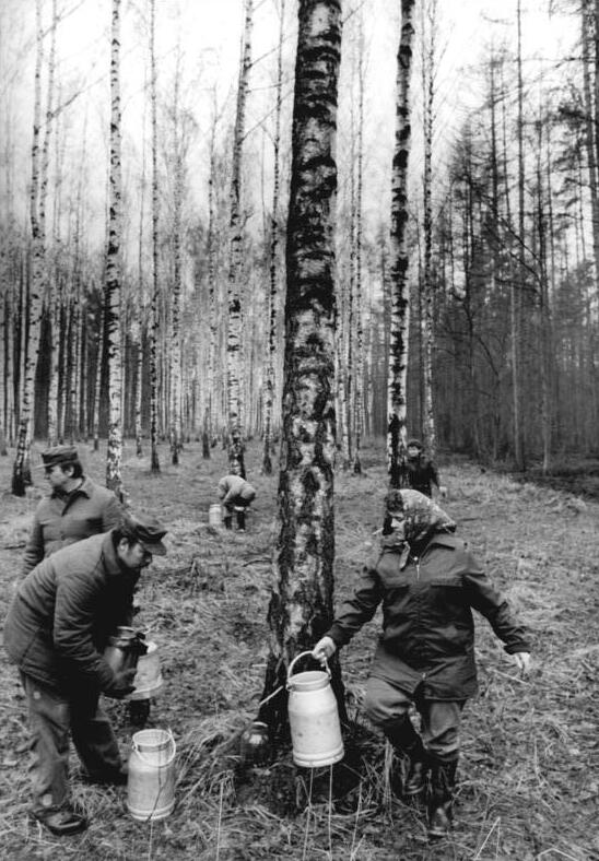 Colditz, Birkensafternte ADN-ZB Kluge 4.4.1985 Bez. Leipzig: Birkensafternte - Ihre diesjährige Birkensafternte bringen gegenwärtig die Forstarbeiter des Colditzer Reviers ein. Dazu bohren sie etwa 4.000 Birken an und stecken Metallröhrchen in die Löcher - pro Baum ein bis drei Stück. Aus diesen Zapfstellen tropfen täglich etwa zwei Liter Birkensaft in die bereitgestellten Gläser. Mit großen Kannen ziehen die Forstarbeiter während der zweiwöchigen Erntezeit durch den Wald und leeren die Gläsr. Der gewonnene Saft - in diesem Jahr rund 80.000 Liter - wird gefiltert, mit Alkohol und Esther versetzt und an die Kosmetikindustrie geliefert. Die Bohrlöcher werden nach der Erntee wieder verpfropft. - sihe auch 1985-0404-4N